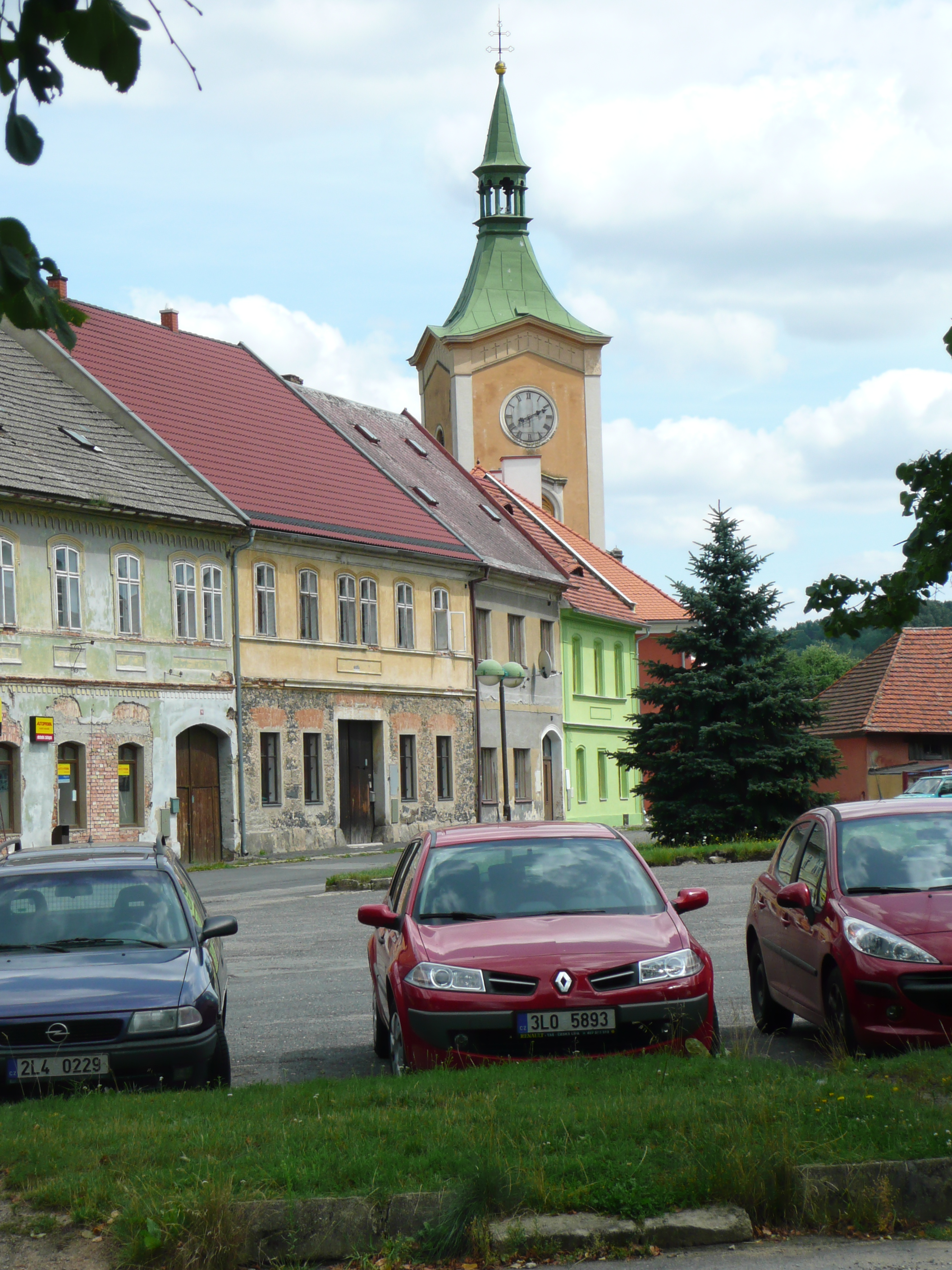 Marktplatz und Kirche von Kravare